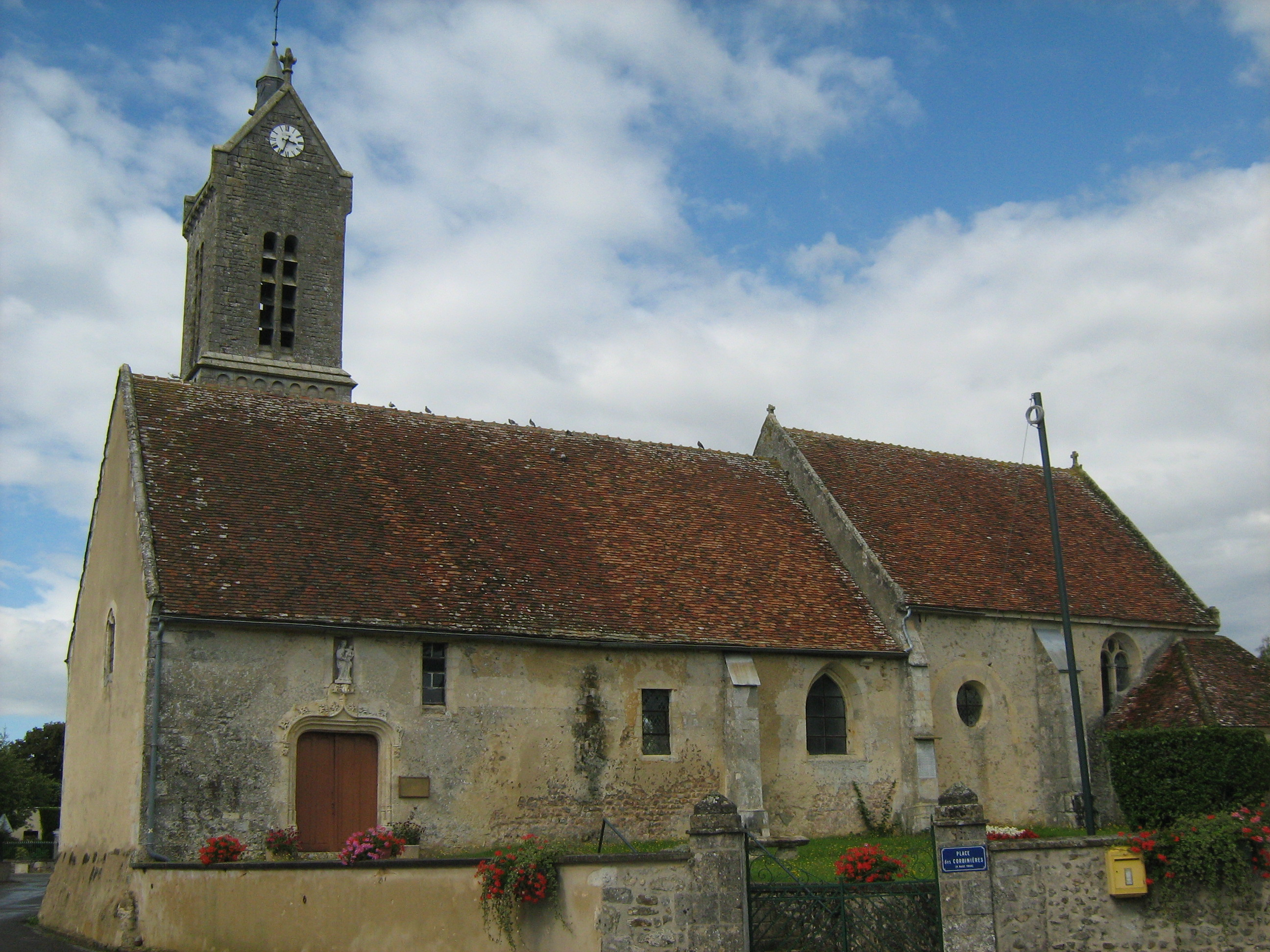 Église Saint-Germain d'Appenai-sous-Bellême, Orne, France.